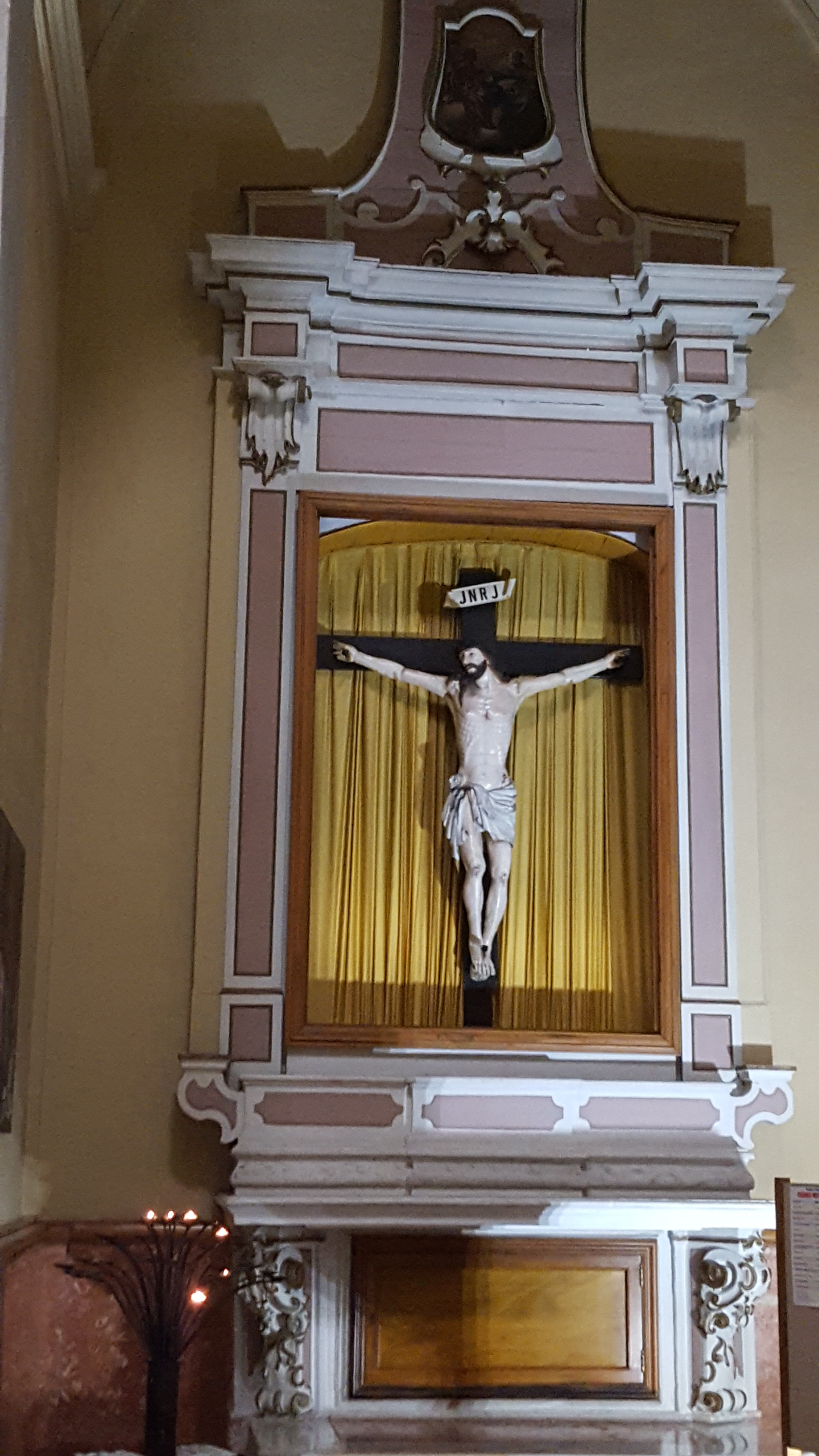 Altare del Crocifisso - San Martino, Martina franca